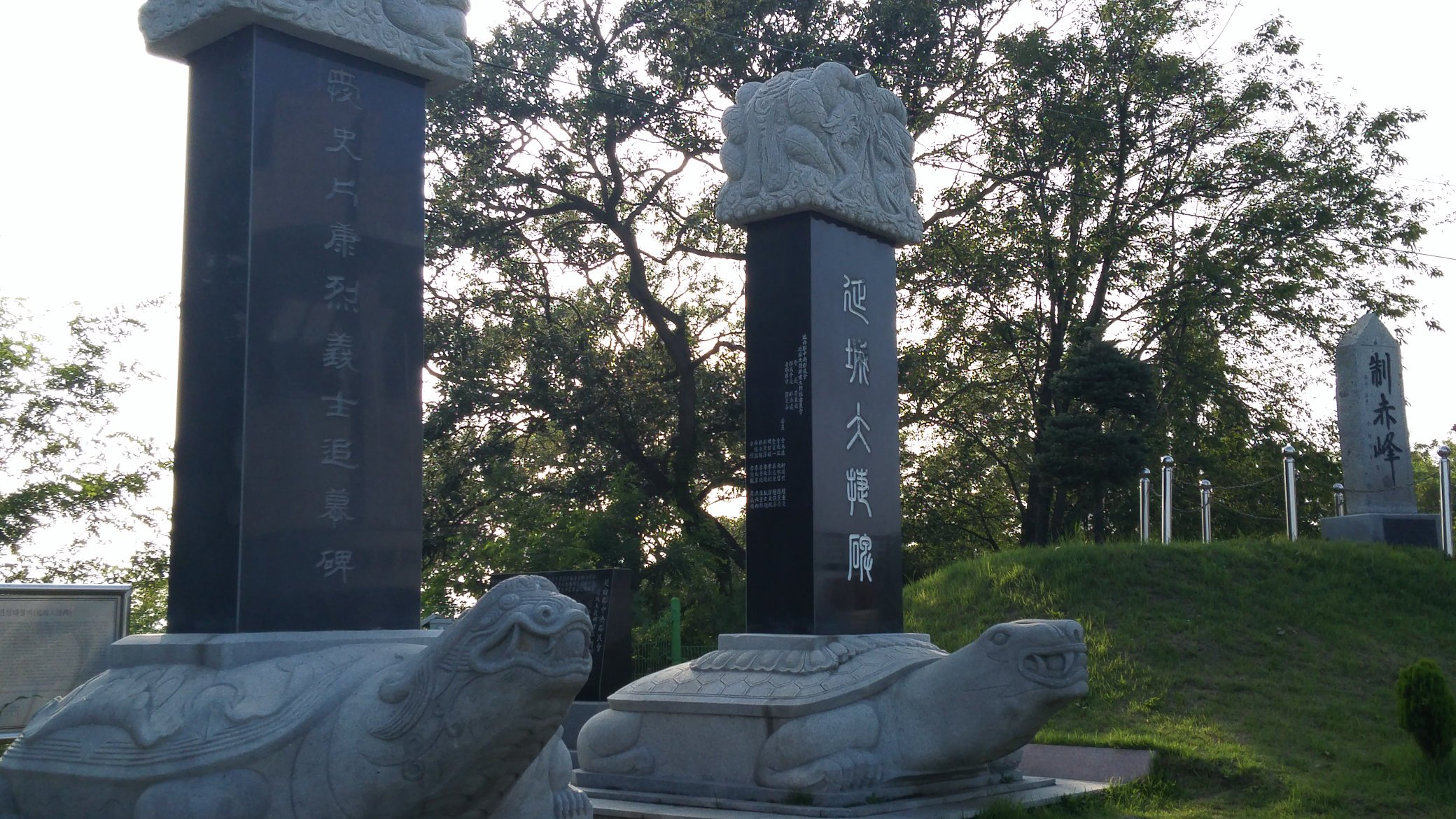 조선말: 임진왜란 승전비와 함께있는 편강렬의사 추모비 오른쪽은 적을 제압한다는 제적봉